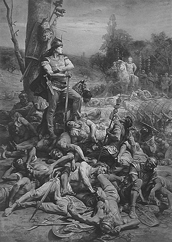 Gravure représentant la défaite de Corréus